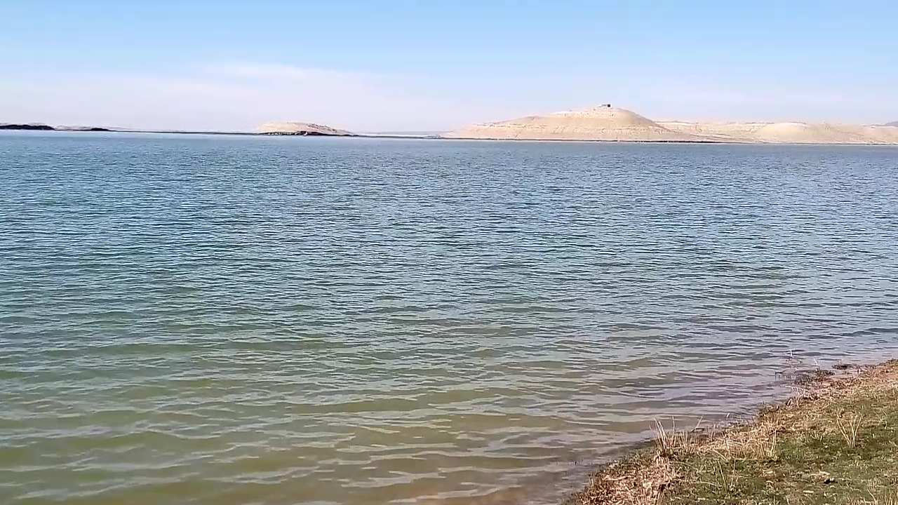 سد طبیعی روستای شوره دل